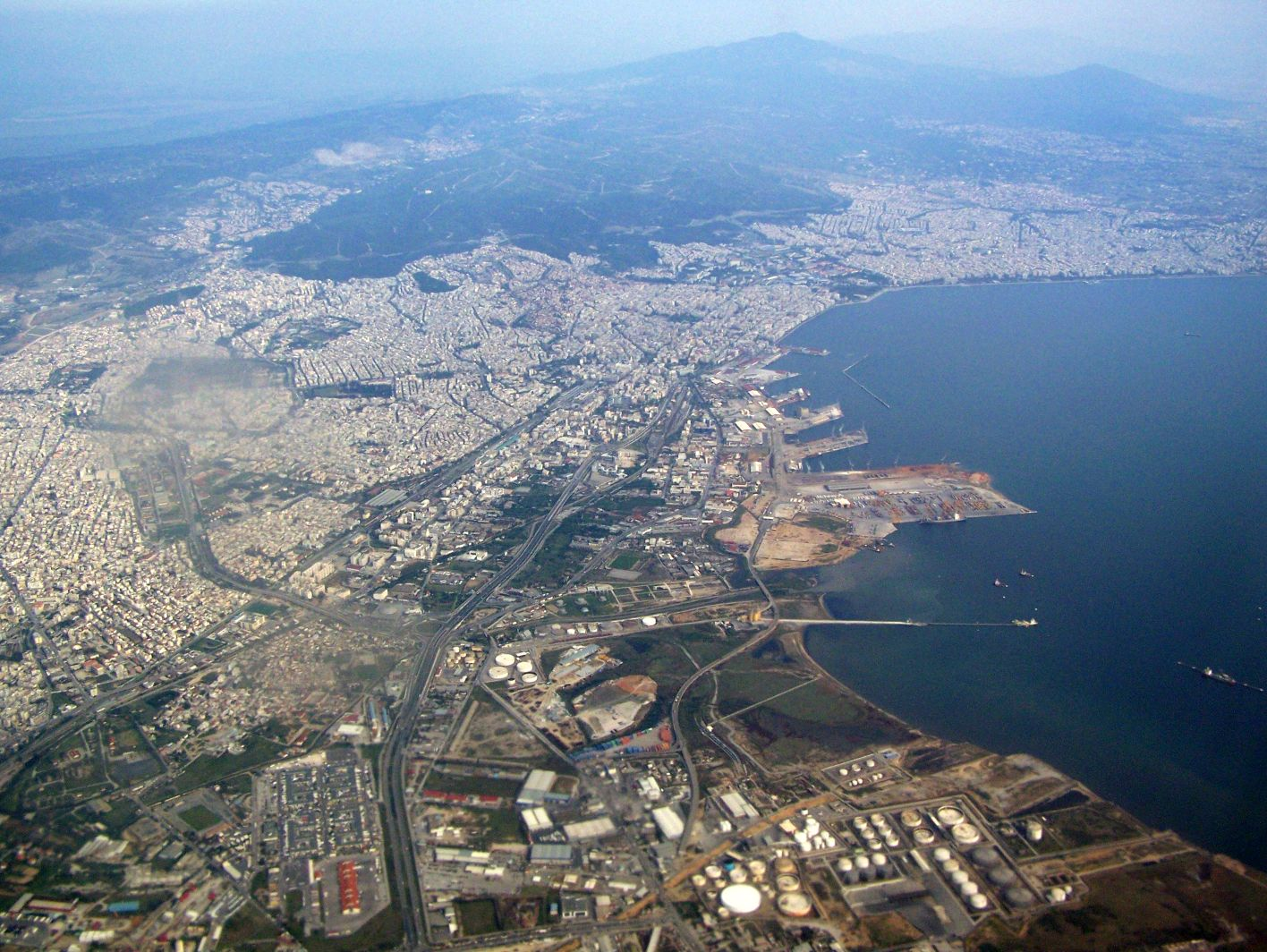 Tessaloniki aus der Luft